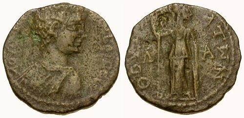 Χάλκινο νόμισμα του Νομισματοκοπείου Θουρίας διαμέτρου 20,83χιλ και μάζας 4,68 γρ. Στον εμπροσθότυπο φέρει καλυμμένη και θωρακοφόρα προτομή του αυτοκράτορα. Στον οπισθότυπο η θεά Αθηνά κρατά δόρυ στο δεξί χέρι ενω ακουμπά το αριστερό στην Ασπίδα της.